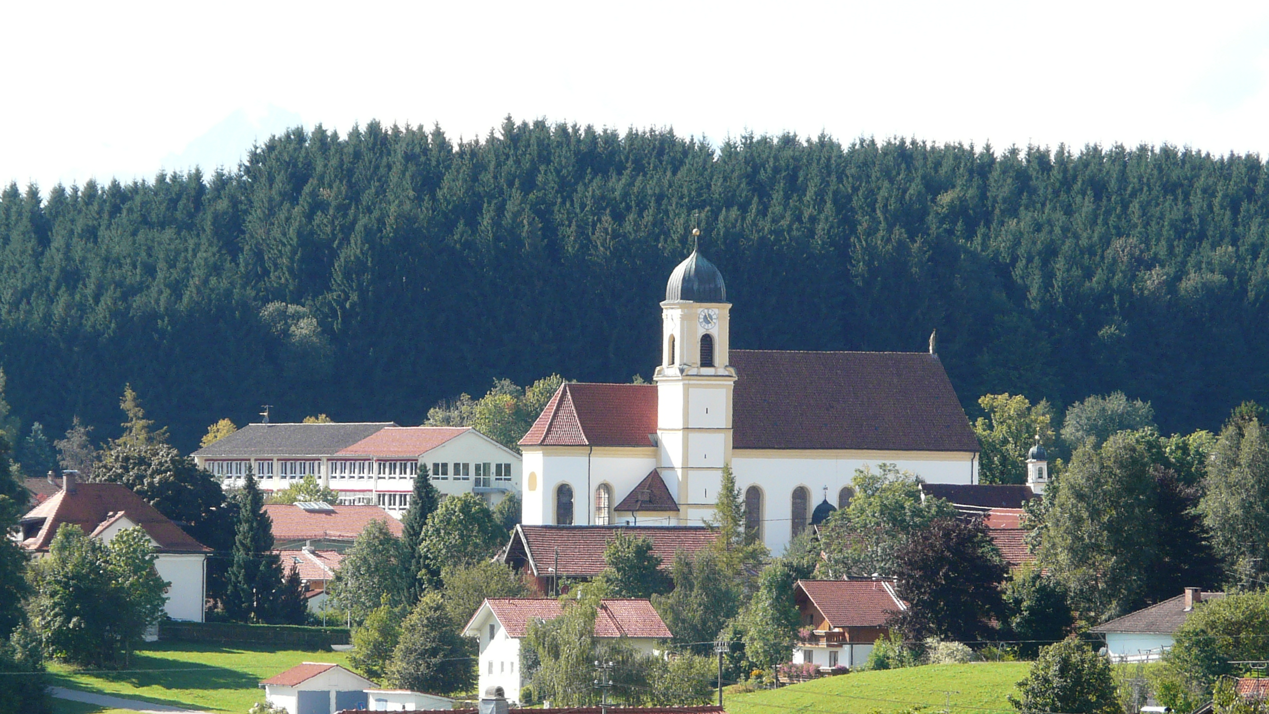 Pfarrkirche in Bernbeuren